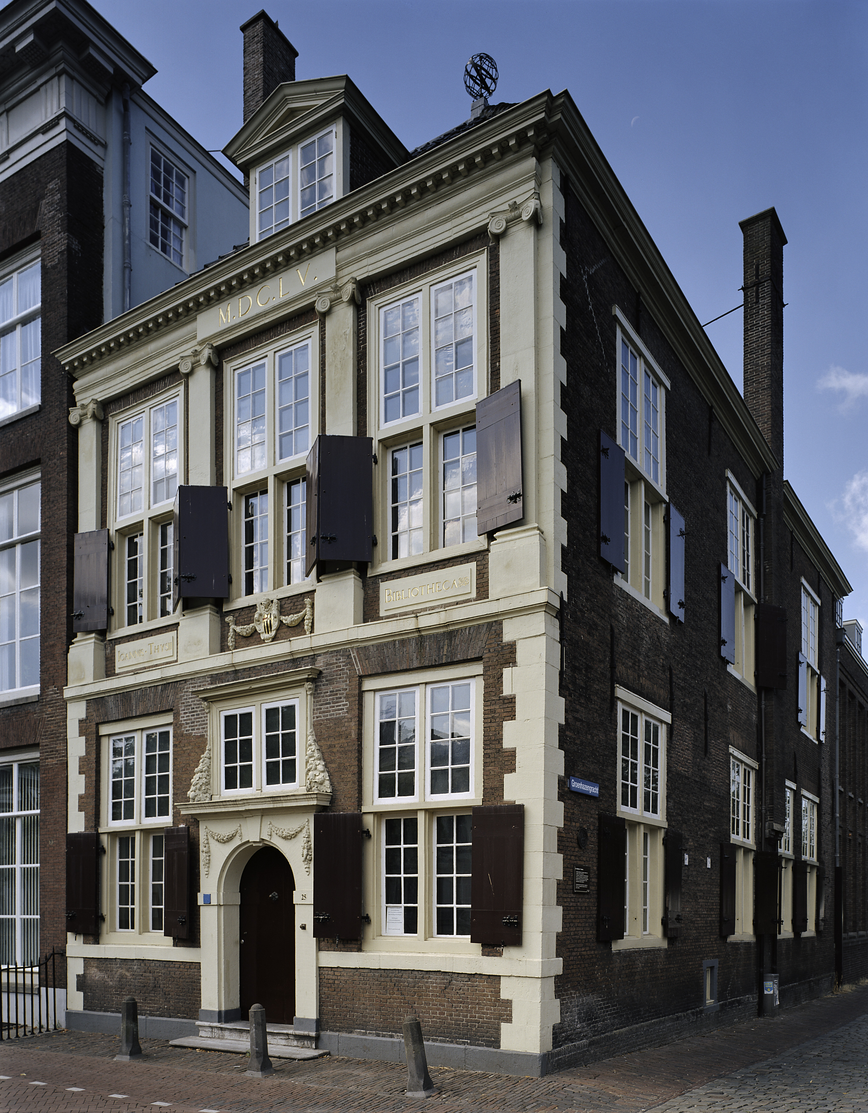 Bibliotheek Thysiana: Voorgevel met zandstenen ingangspoortje (opmerking: Gefotografeerd voor Monumenten In Nederland Zuid-Holland)